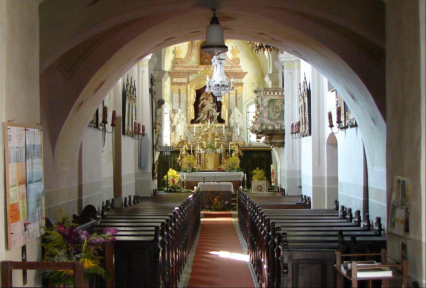 Kloster Schönbühel, Österreich